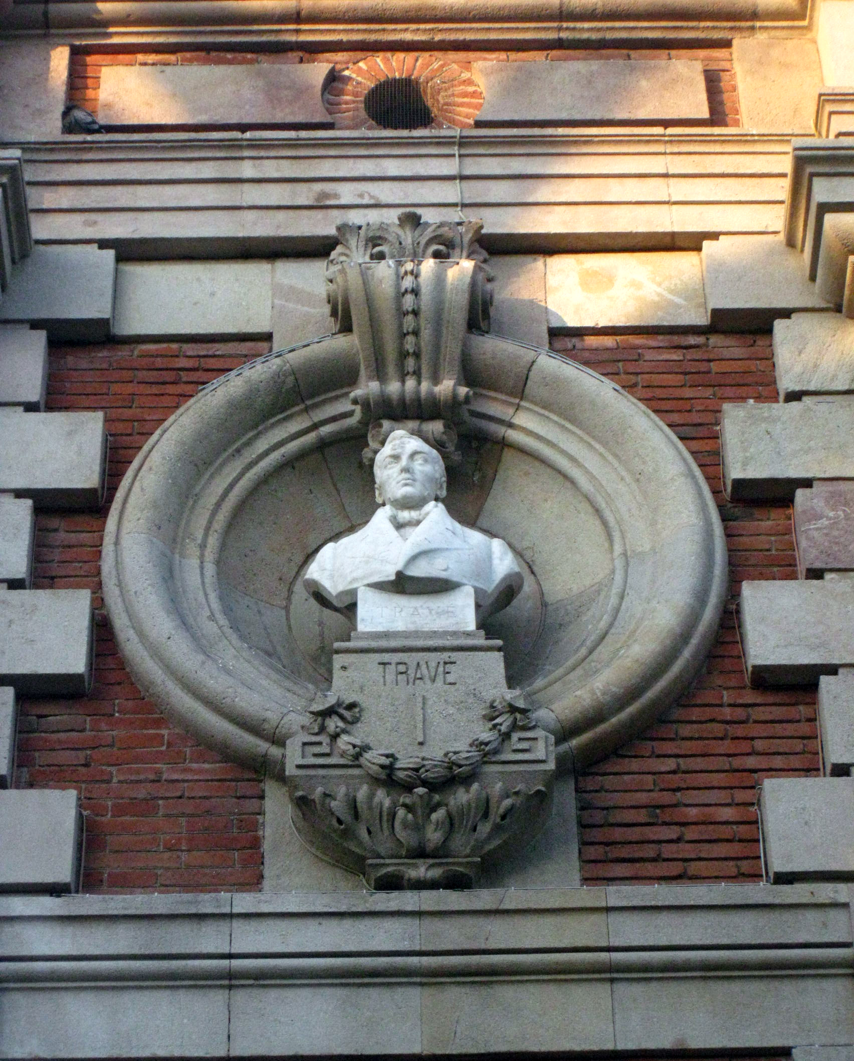 Palau del Parlament de Catalunya (Barcelona) Object location41° 23′ 16.47″ N, 2° 11′ 19.04″ E